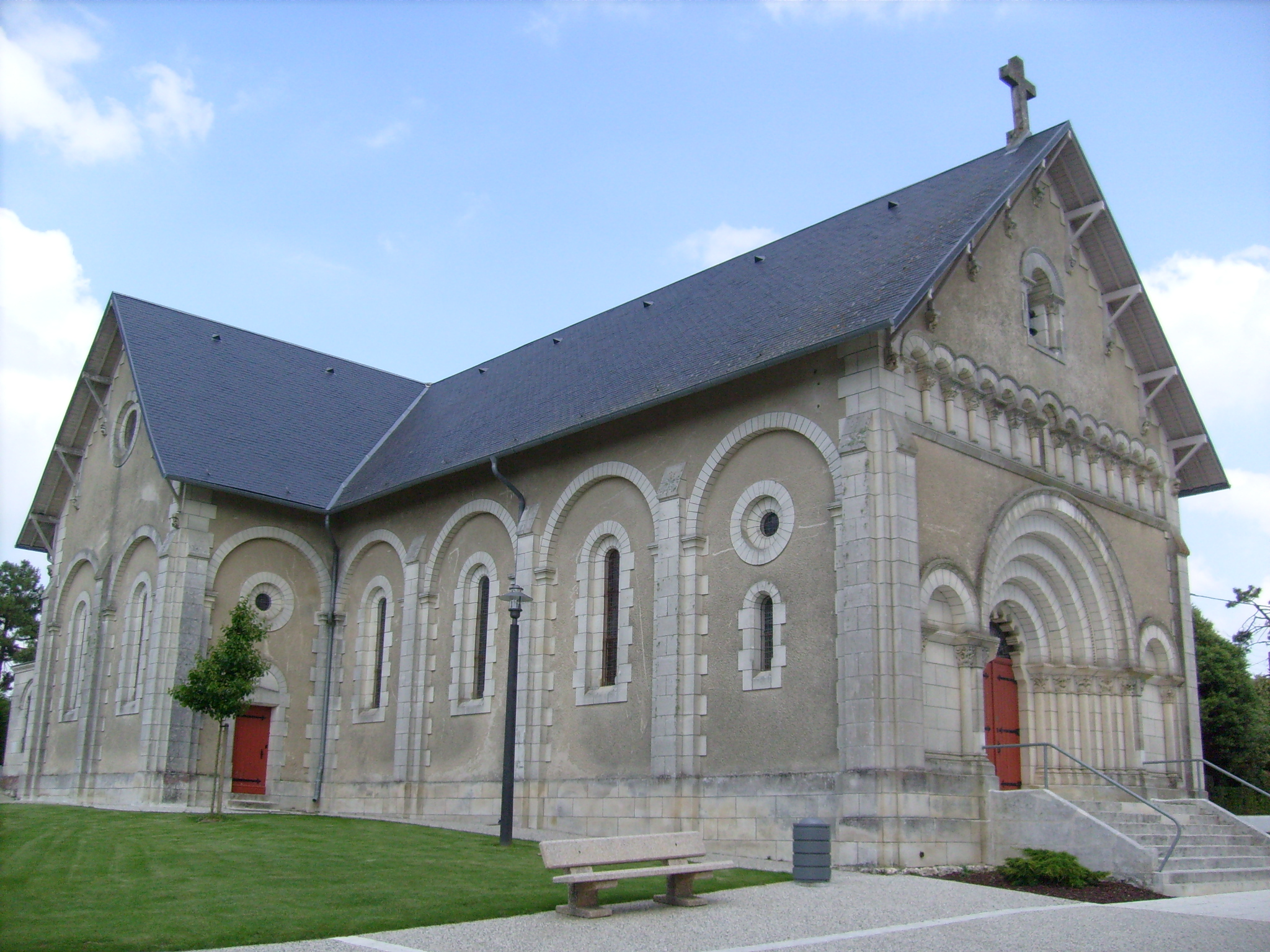 Eglise Saint Pallais, Saint Palais sur mer